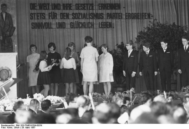 Zentralbild/Kohls 3.4.1967 Bezirk Potsdam: Jugendweihe in Rheinsberg 74 Jungen und Mädchen erhielten am 26.3.1967 im Kulturhaus des Atom-Kraftwerkes Rheinsberg ihre Jugendweihe.